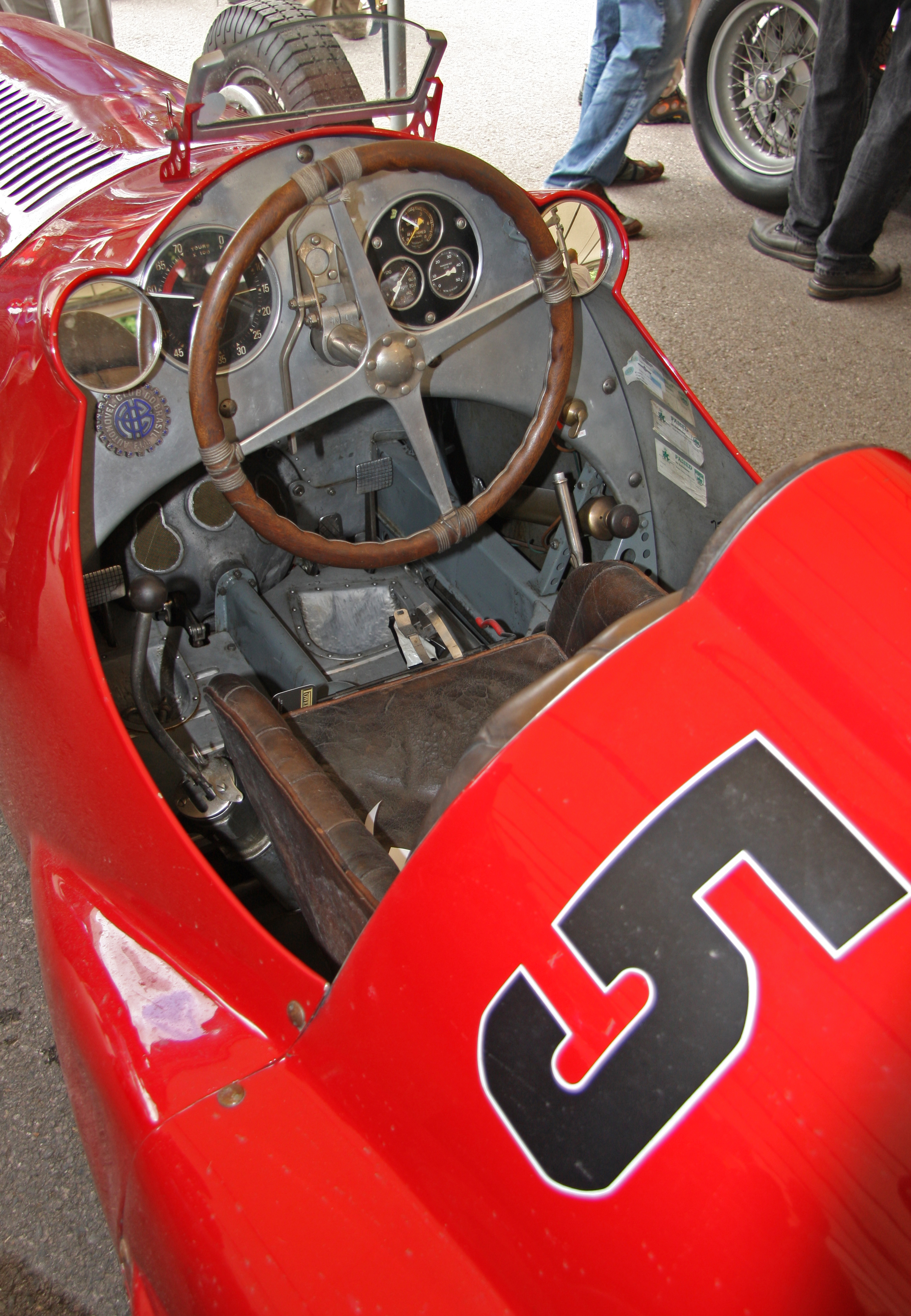 Alfa Romeo 308 Built 1938. 3 litre 8 cylinder